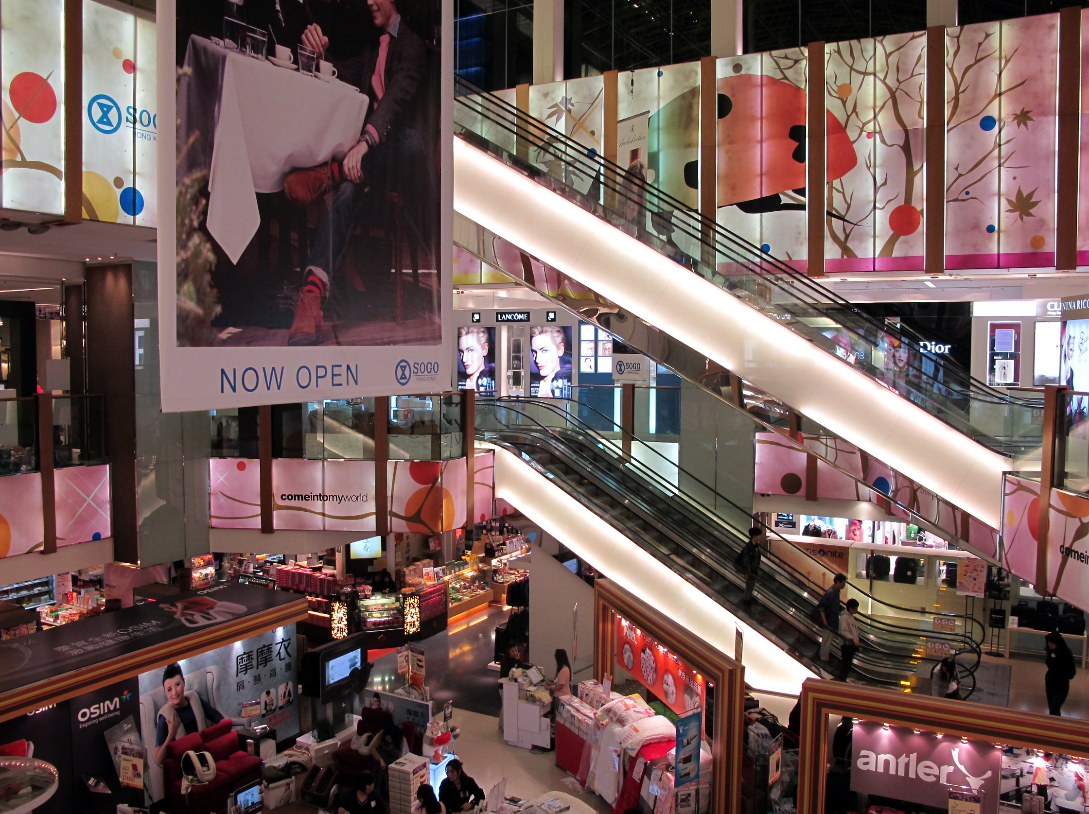 SOGO TST Atrium